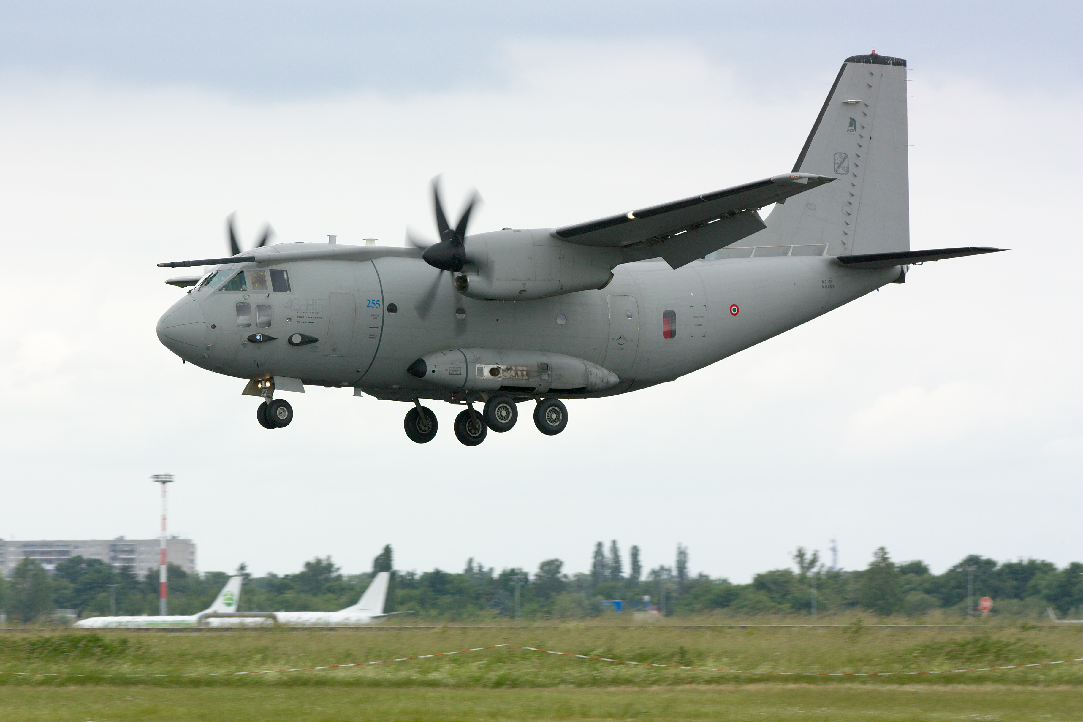 Alenia C27J Spartan at ILA 2010